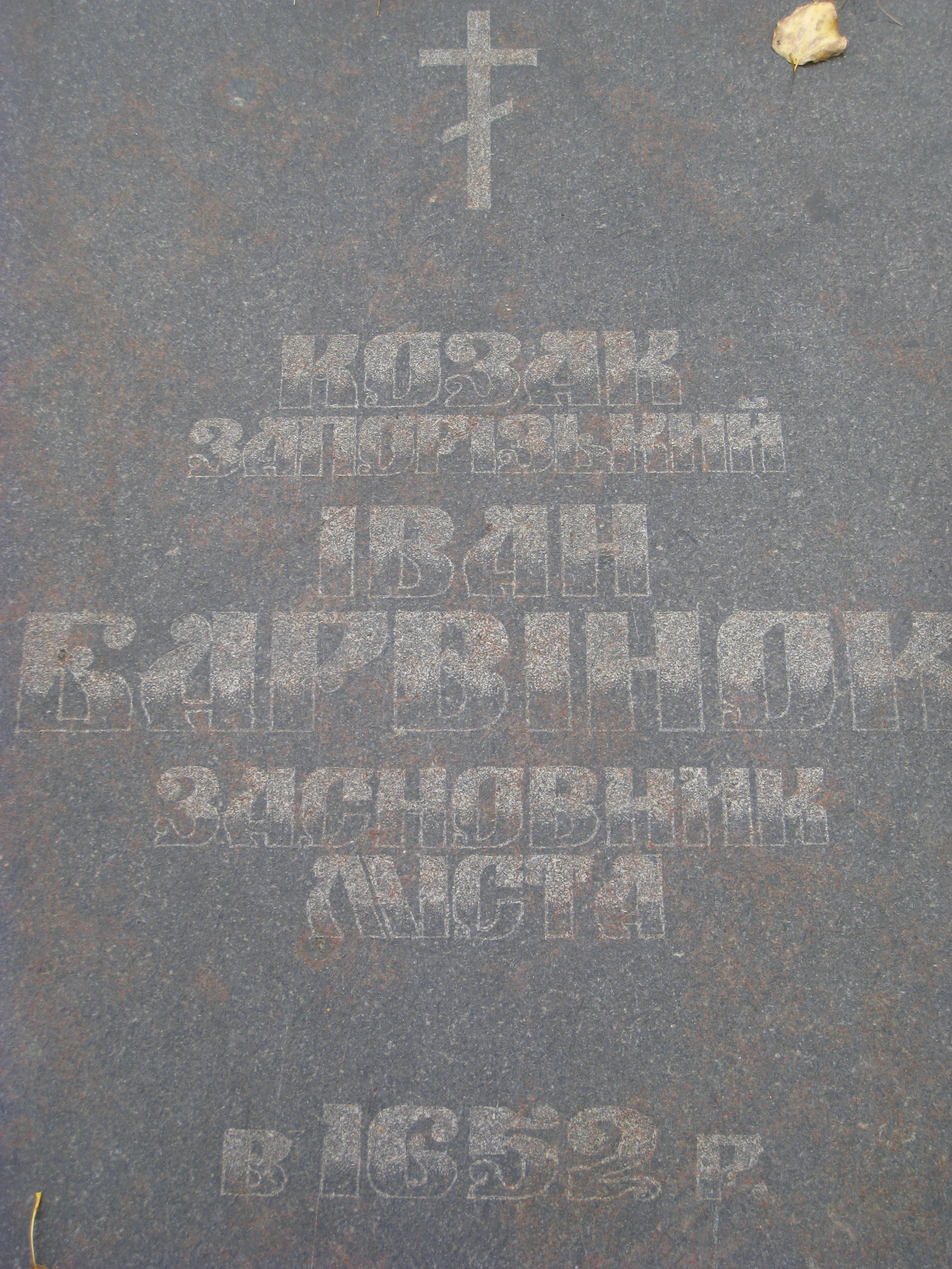 Пам'ятник козаку Івану Барвінку., Барвінкове, центр